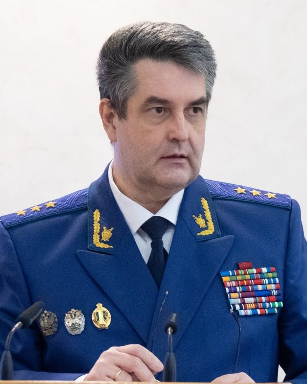 Николай Александрович Винниченко (род. 1965) — российский государственный деятель